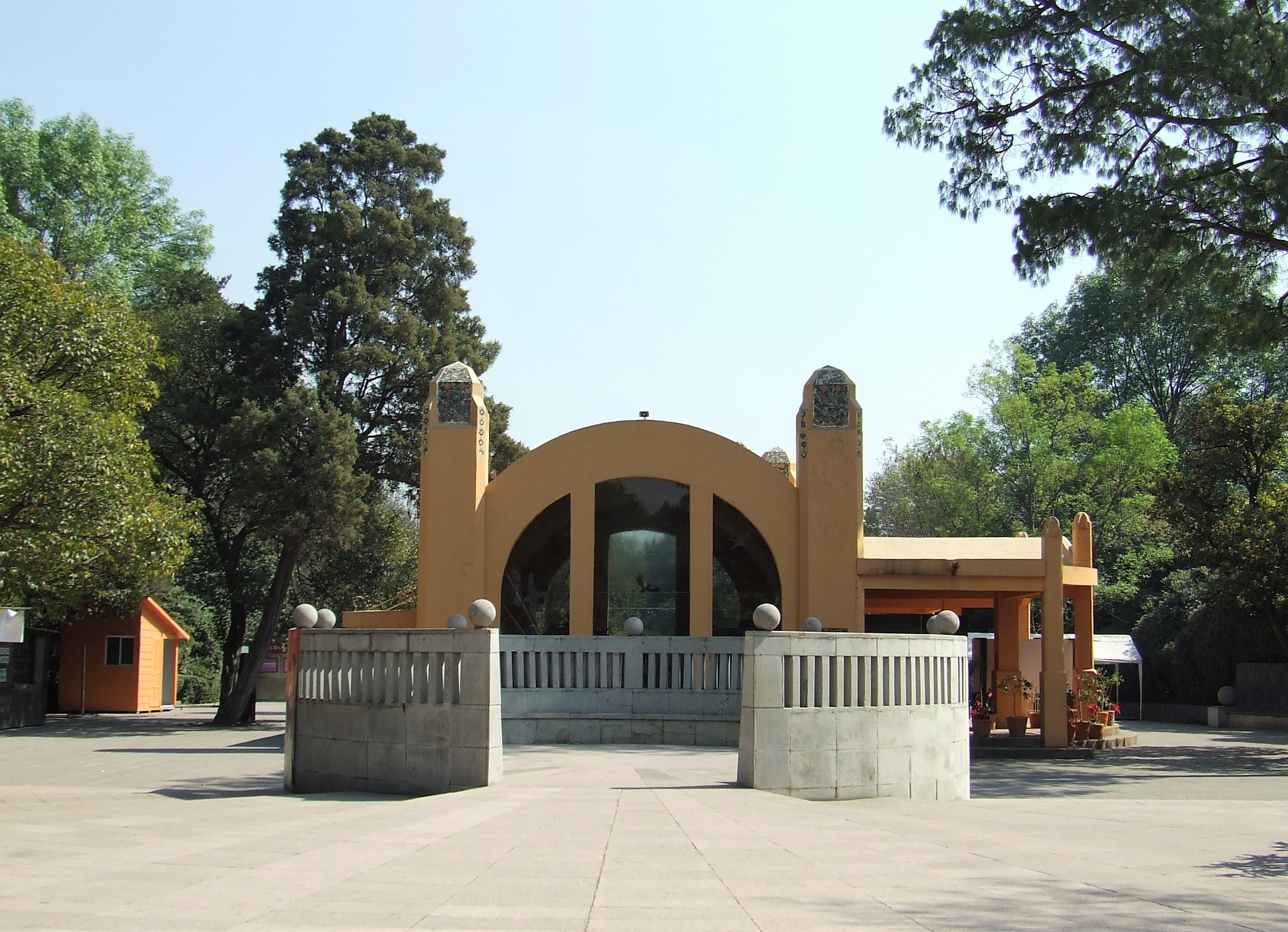 Entrada Zoológico de Chapultepec